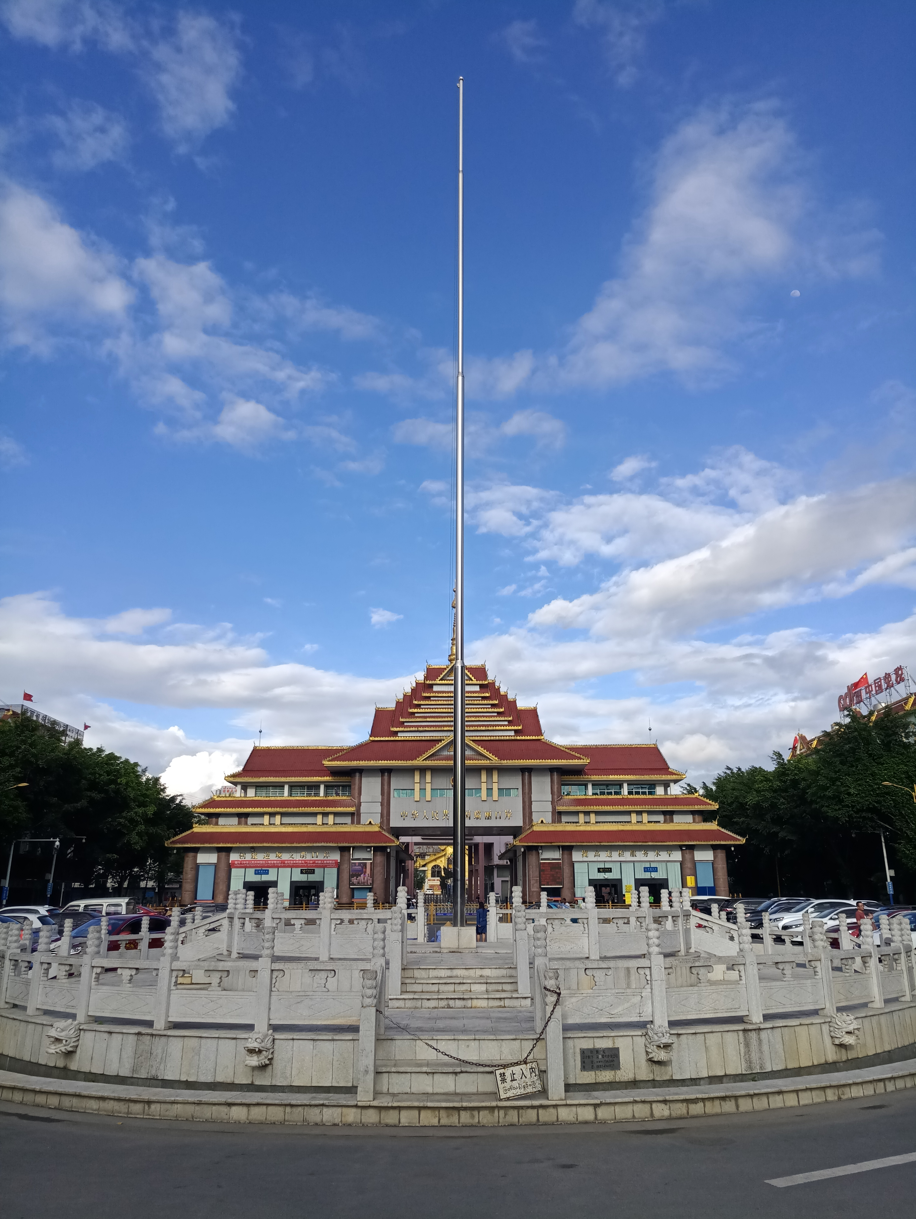 中文（中国大陆）: 中缅边界瑞丽口岸